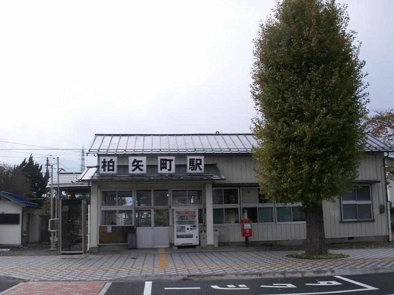 （2006年11月、投稿者Jnr bus撮影）